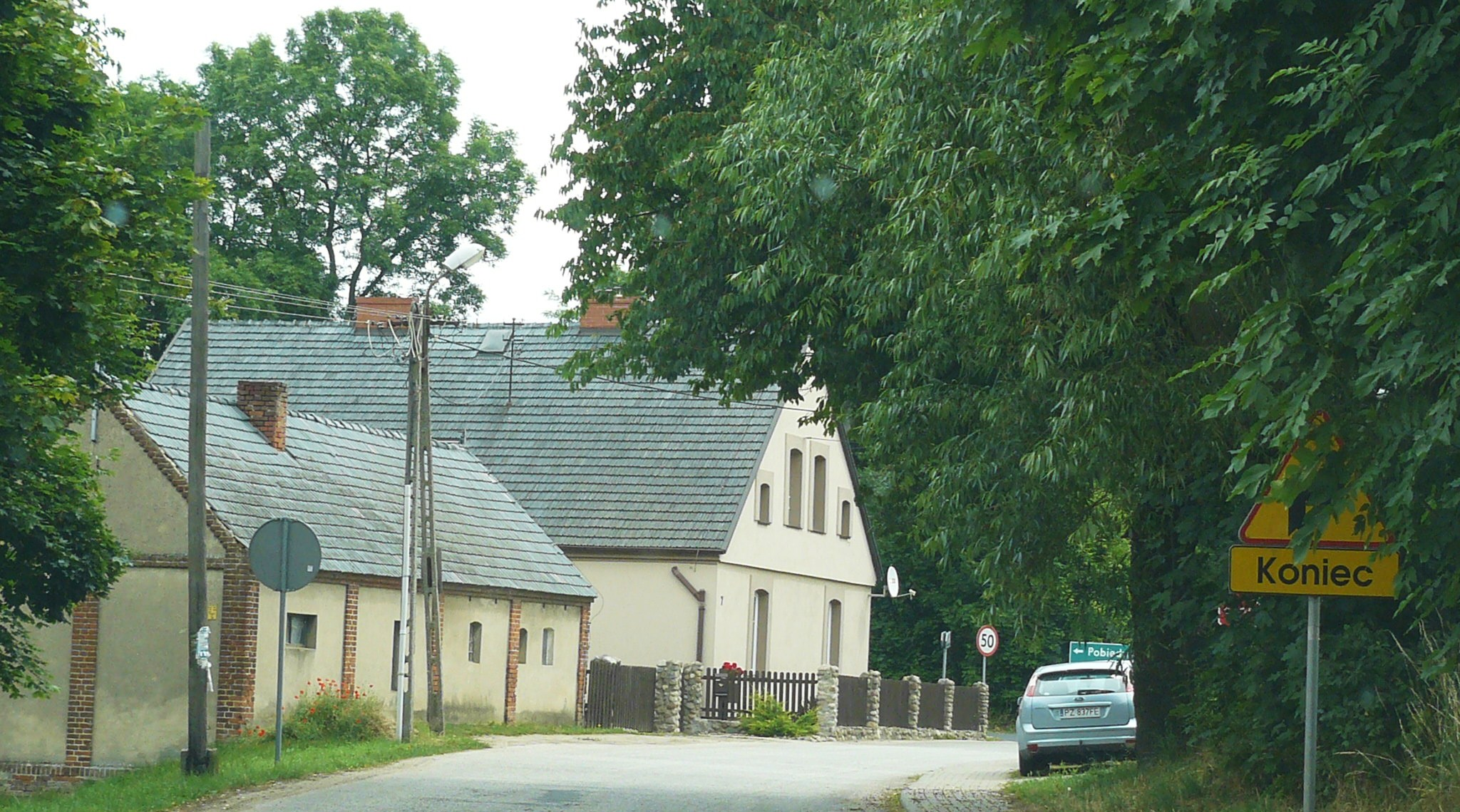 Promno. Zabudowania w centrum wsi.